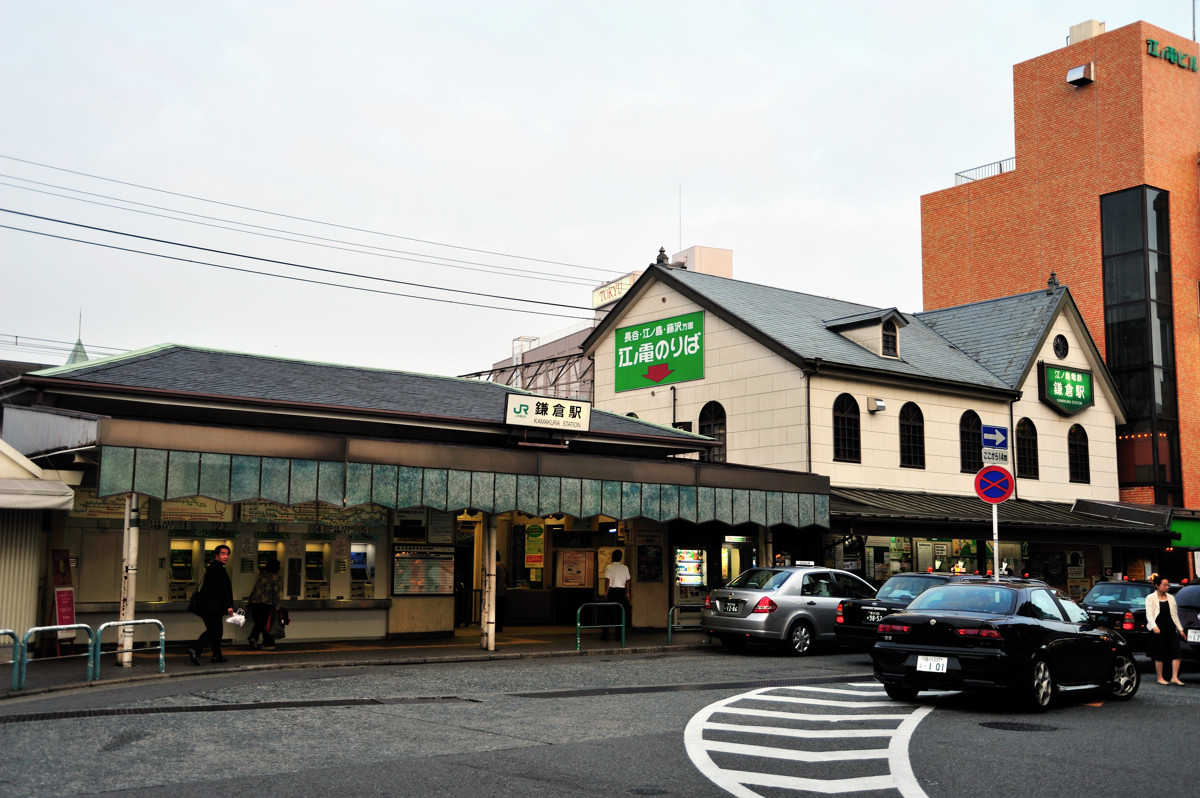 鎌倉車站 西口